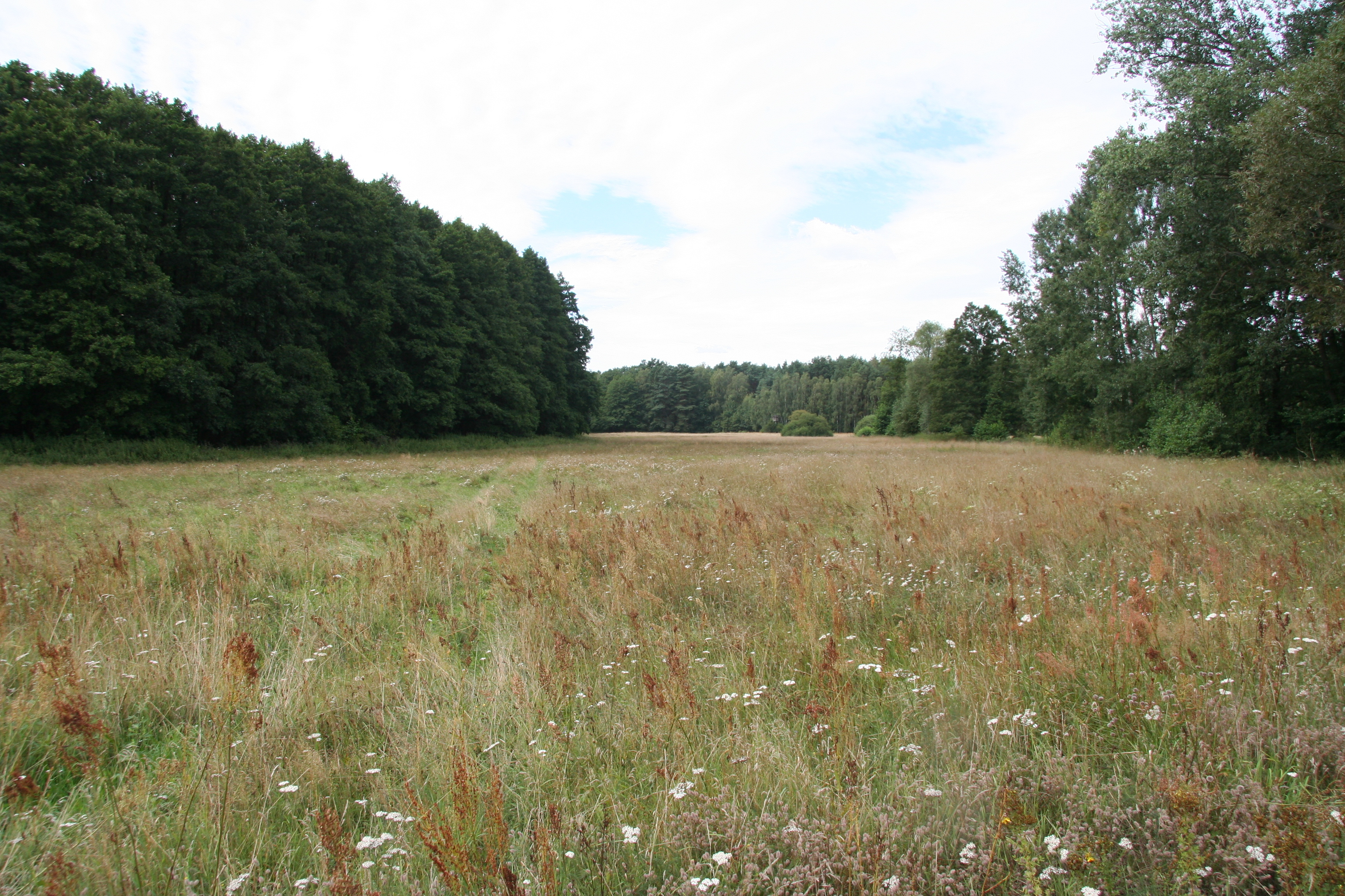 FFH-Gebiet und Naturschutzgebiet "Dollgener Grund"